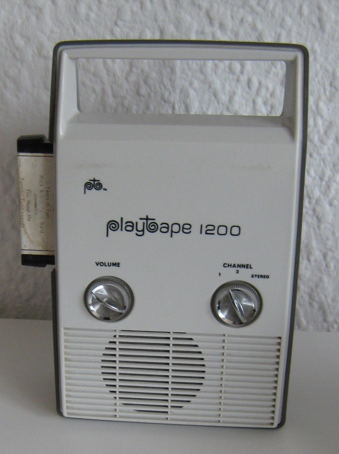 PlayTape 1200 Player von 1967.